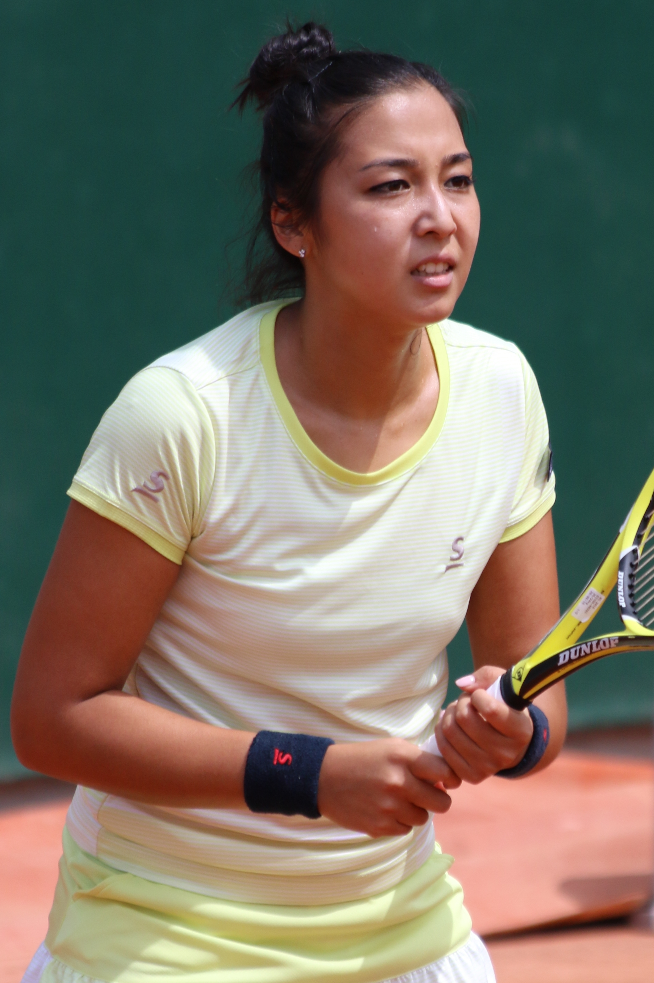 Diyas RG18 (3)